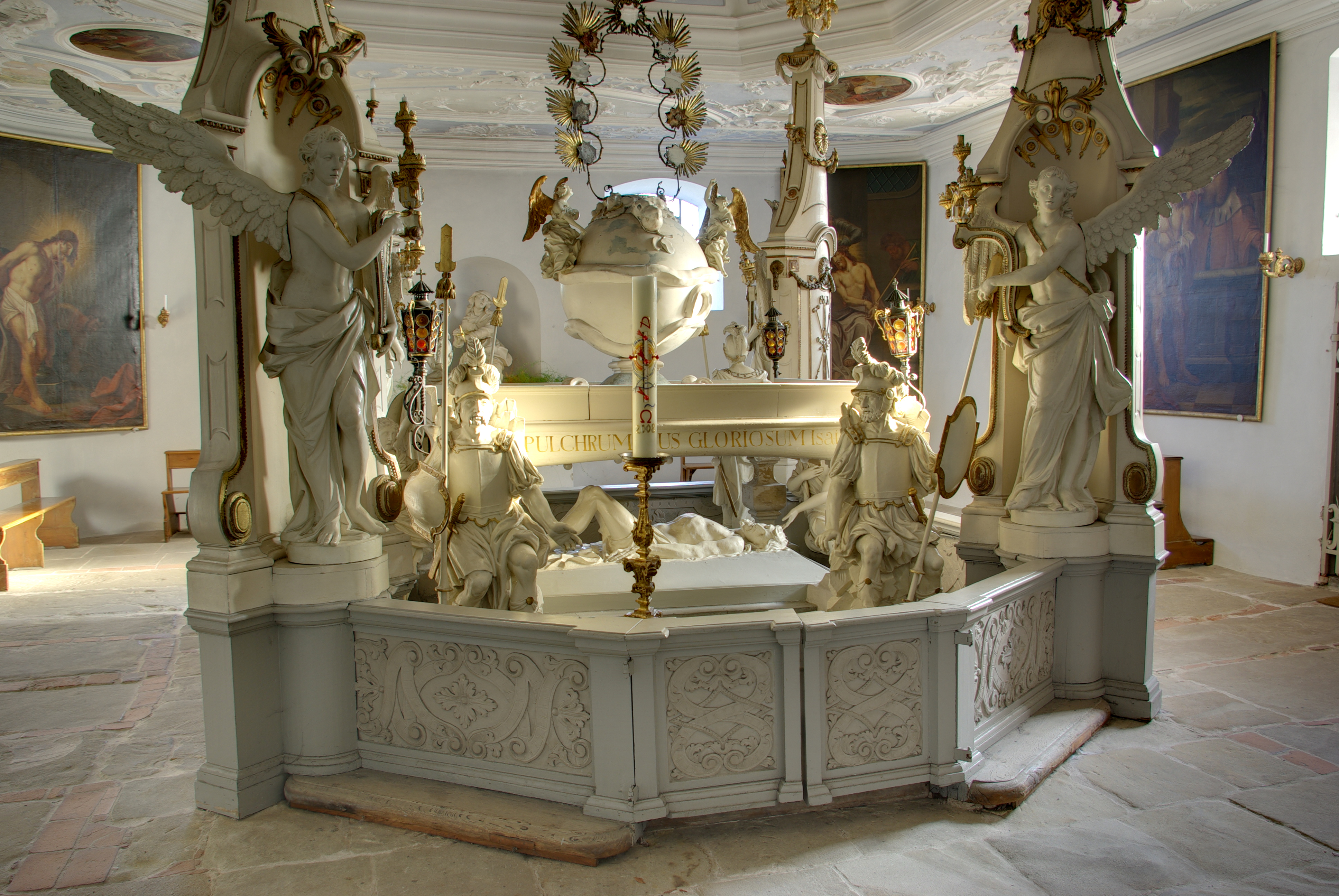 Bamberg, St. Michael, Heilig-Grab-Kapelle